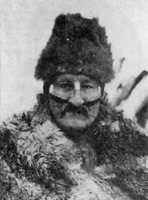 Tenenisk, famoso sciamano, per metà Manekenk e per metà Selknam.